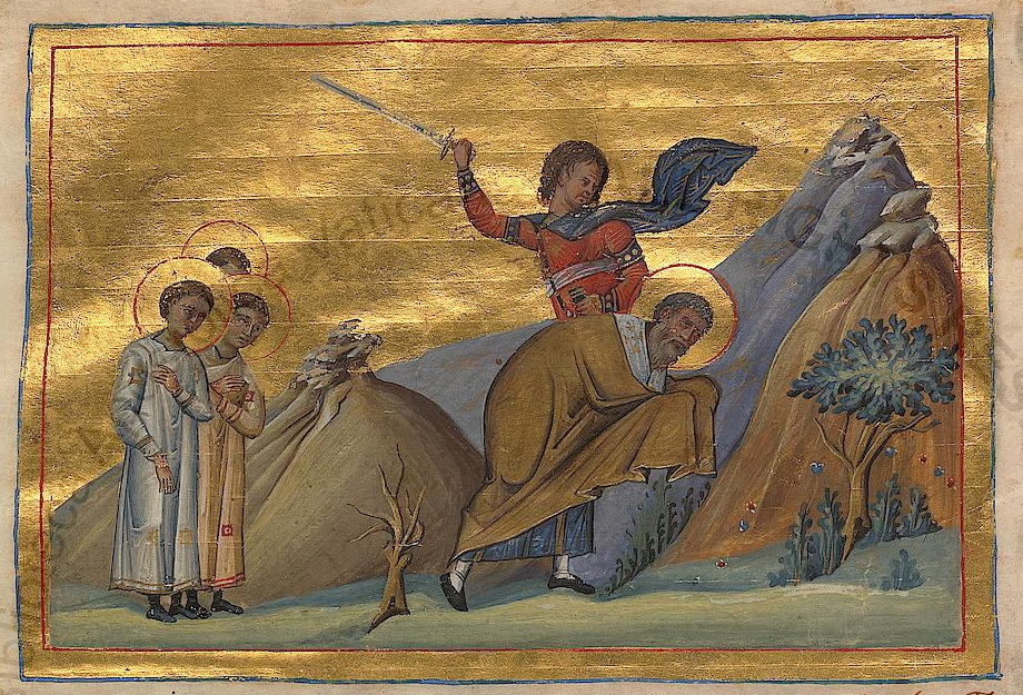 Священномученик Вавила и с ним три отрока Урван, Прилидиан, Епполоний и мать их Христодула Константинополь. 985 г. Миниатюра Минология Василия II. Ватиканская библиотека. Рим.